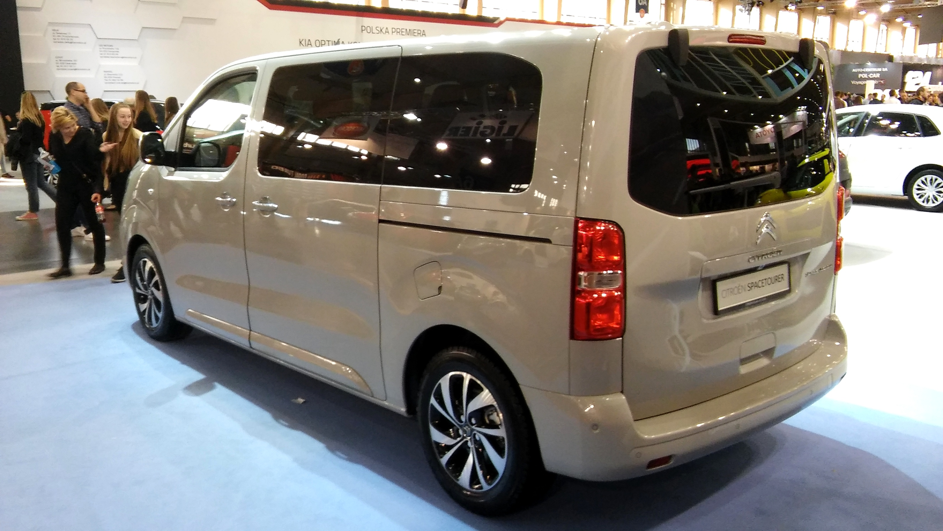 Citroën Spacetourer on Poznań Motor Show 2016